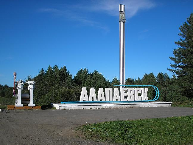 Алапаевск - город областного подчинения, центр одноименного административного района